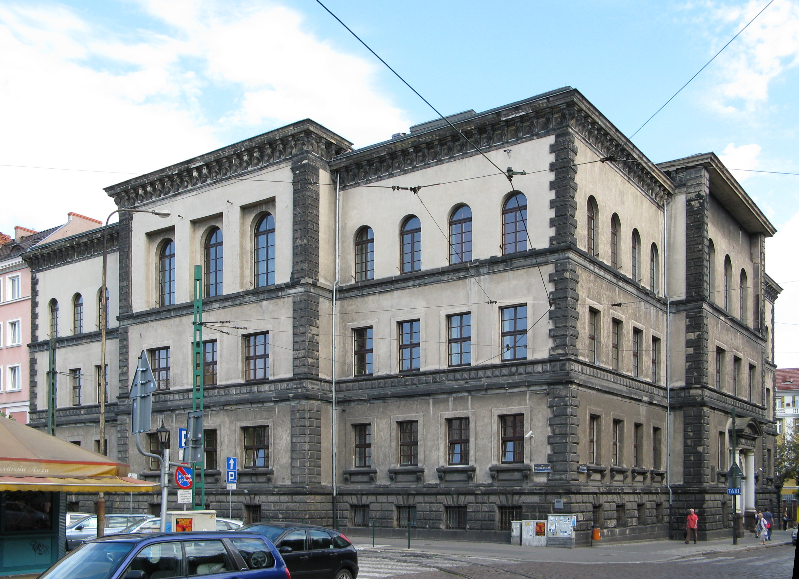 Poznań, ul. 23 Lutego 41/43 - w latach 1879-1919 Najwyższy Sąd Krajowy, obecnie archiwum, 1879-1882 (zabytek nr A 220)